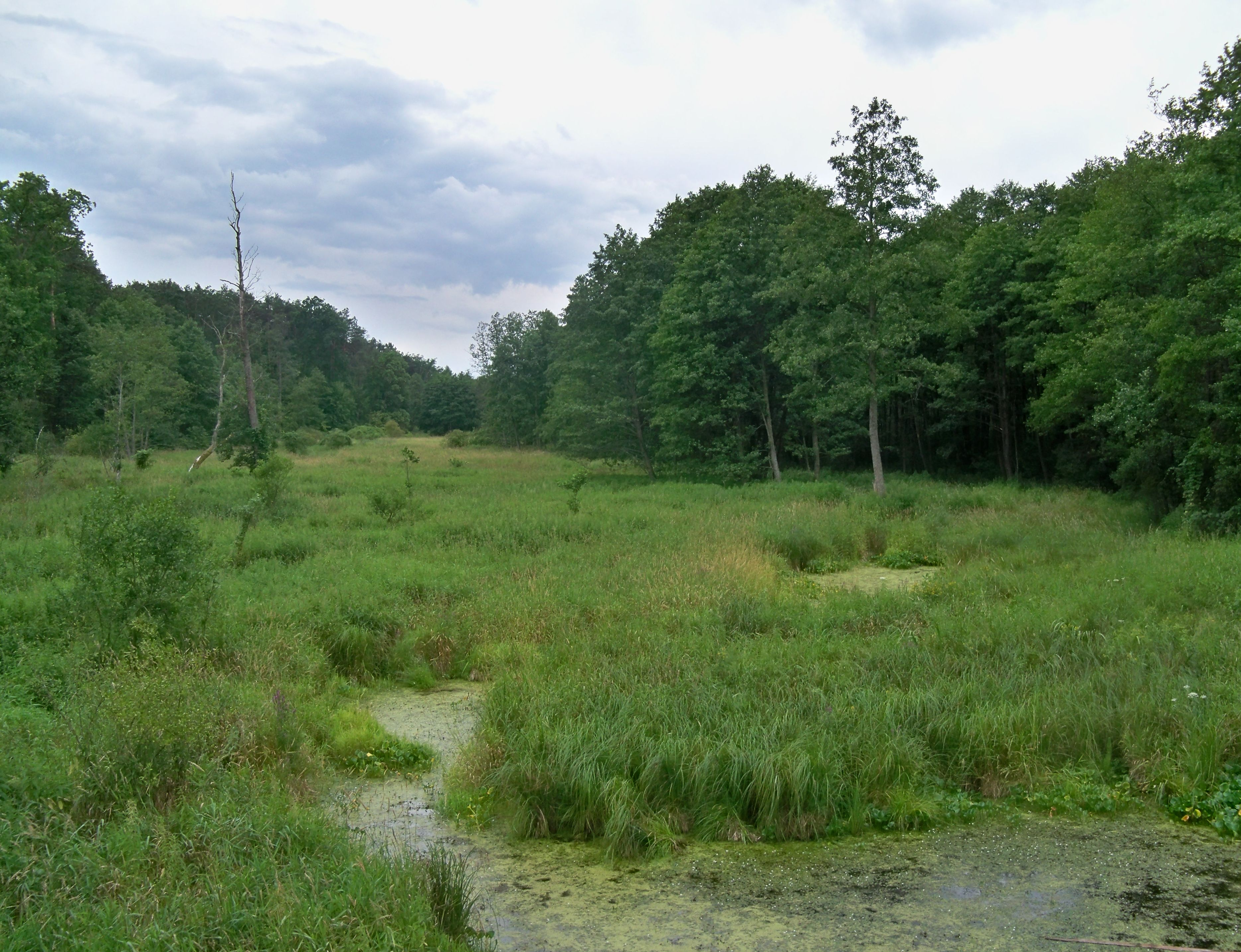 Ścieżka dydaktyczna "Królewskie Źródła". Rozlewisko Zagożdżonki widziane z wieży widokowej. See also: File:Rozlewisko Zagozdzonki.jpg.